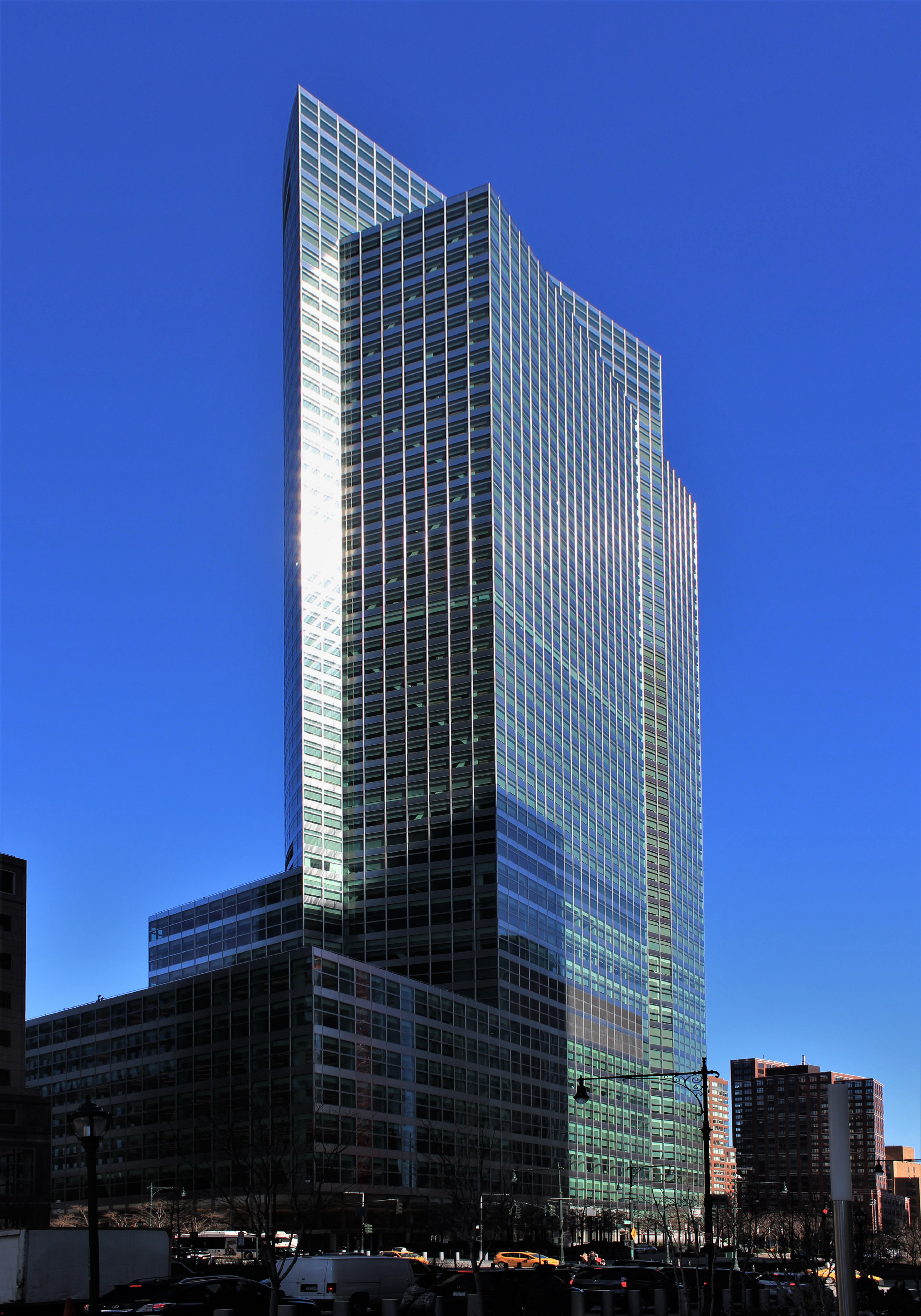 200 West Street